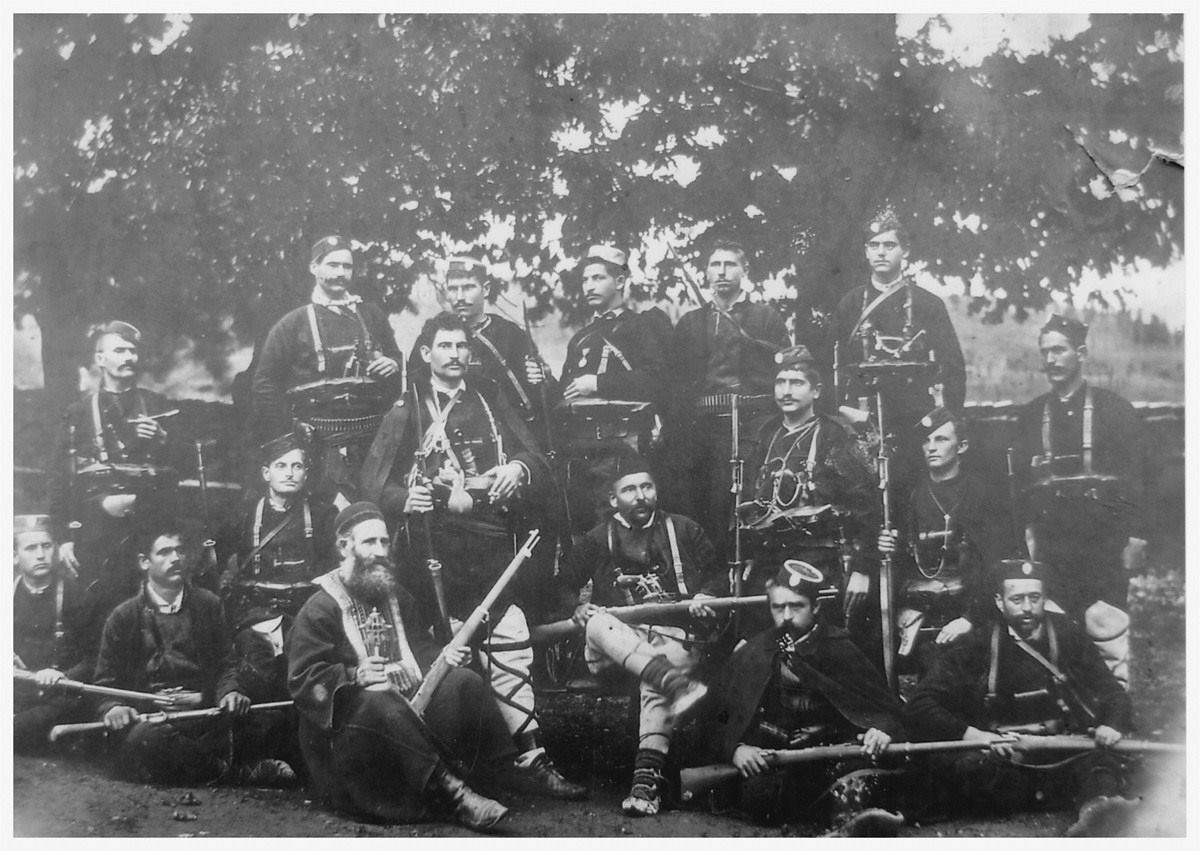 Војвода Крста Ковачевић са четом. Поред њега, са крстом, поп Златко, који је заклињао чете пре уласка на турску територију. Фотографија настала 1905. испред манастира Свети Пантелејмон, у селу Лепчинце, 20-ак км од Врања.